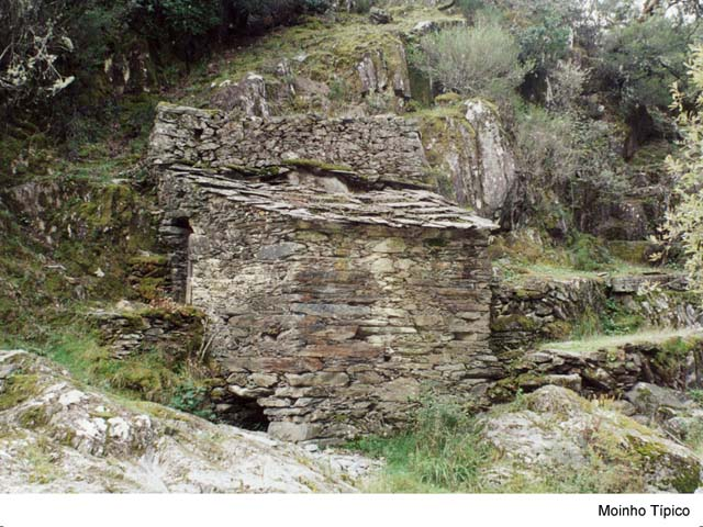 Moinho típico na Freguesia de Alvito da Beira